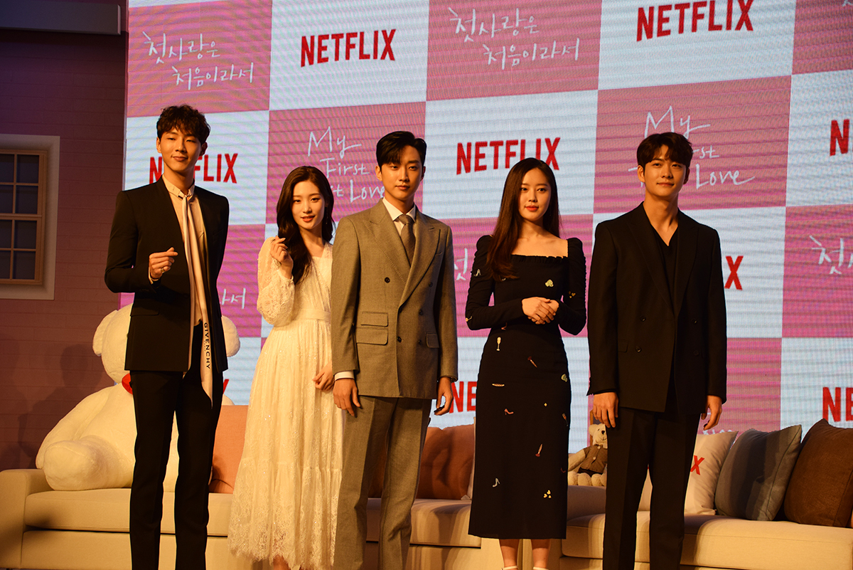 넷플릭스오리지널 첫사랑은처음이라서 제작발표회 (2019.4.12)